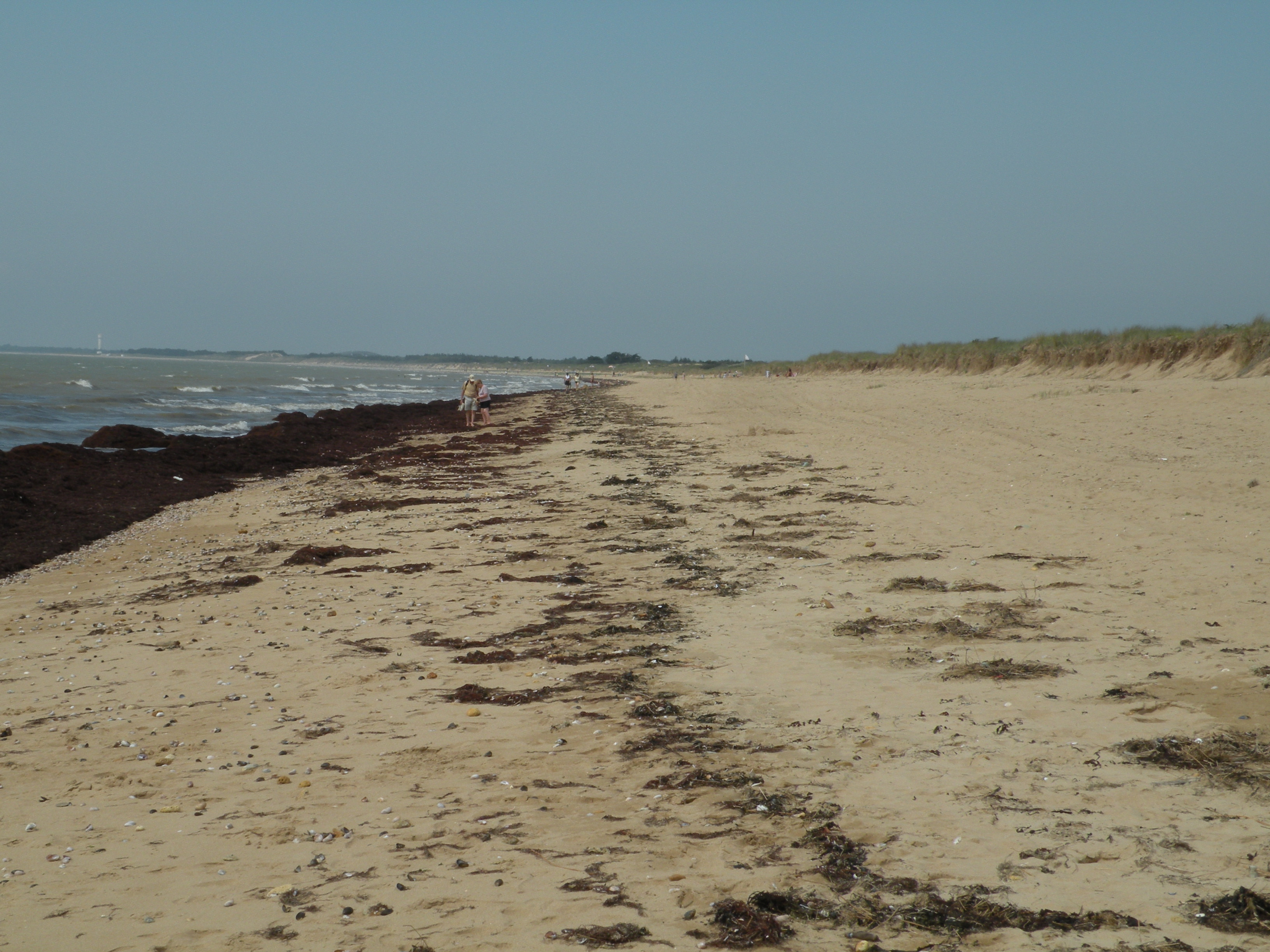 La plage de la Braie à Notre-Dame-de-Monts.